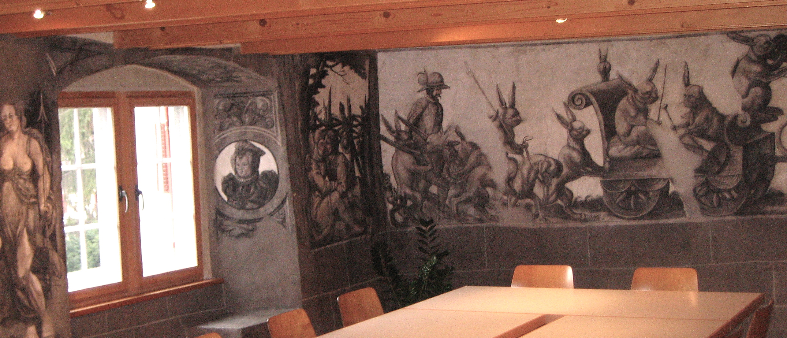 Hasenstube